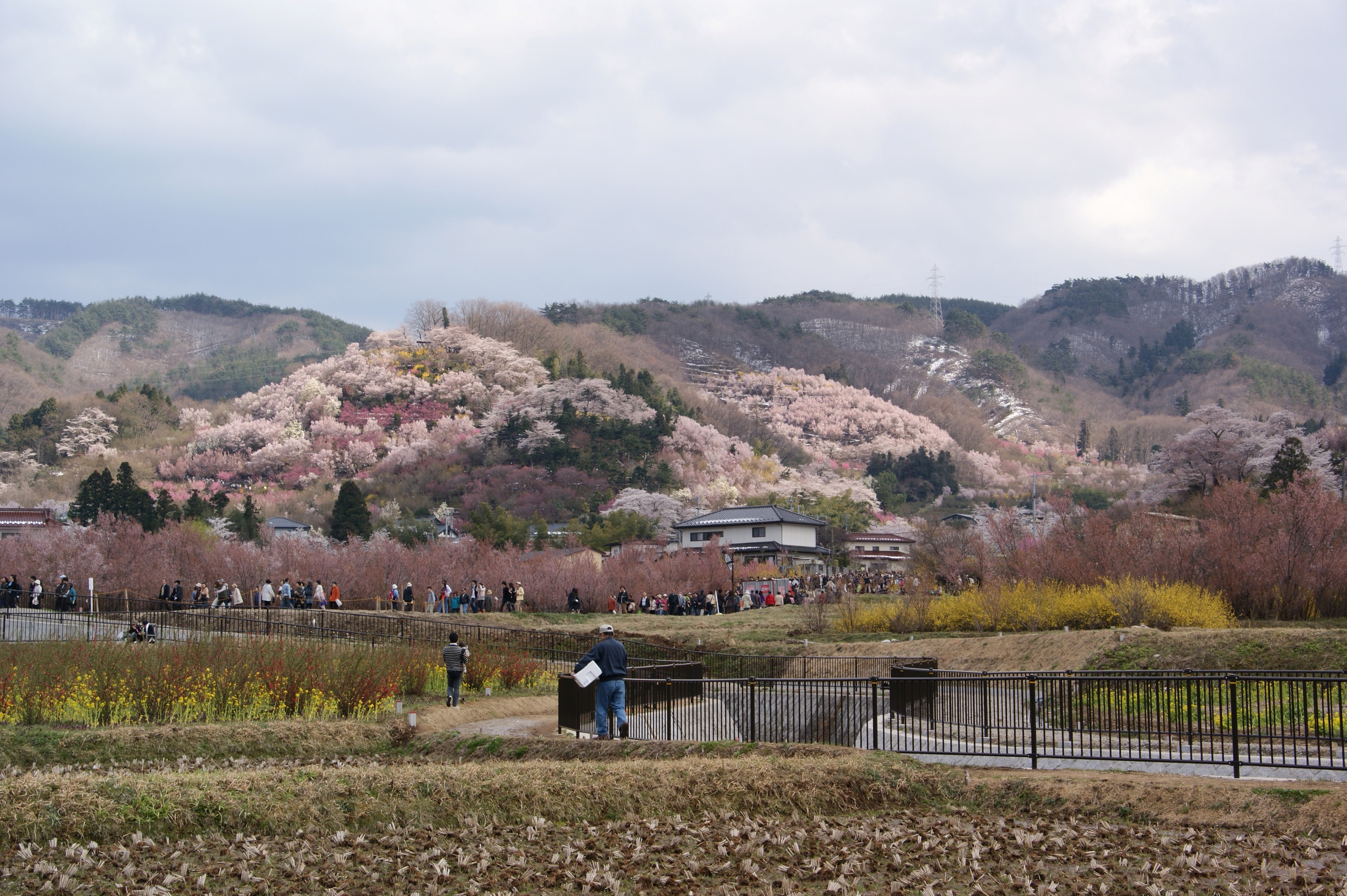 Description 花見山公園全景。菜の花、ボケ、東海桜、レンギョウ、サクラなどの花咲き誇る。 Date2010年4月18日撮影SourceSelf-photographedAuthorBehBehOther versions Category:福島市の画像 花見山公園全景。菜の花、ボケ、東海桜、レンギョウ、サクラなどの花咲き誇る。